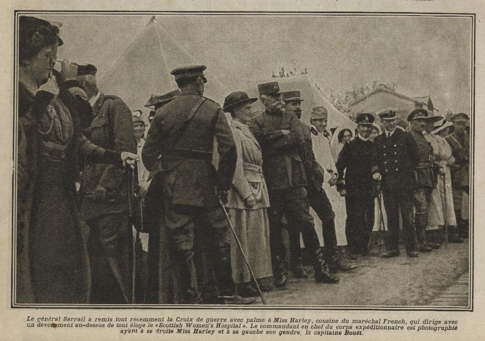 Miss_Harley_(cousine du maréchal French)reçoit la croix_de guerre avec_palme des_mains du général Sarrail, elle s'occupe des ambulances (scottish women's hospital) sur le front de Macédoine et y trouvera la mort.